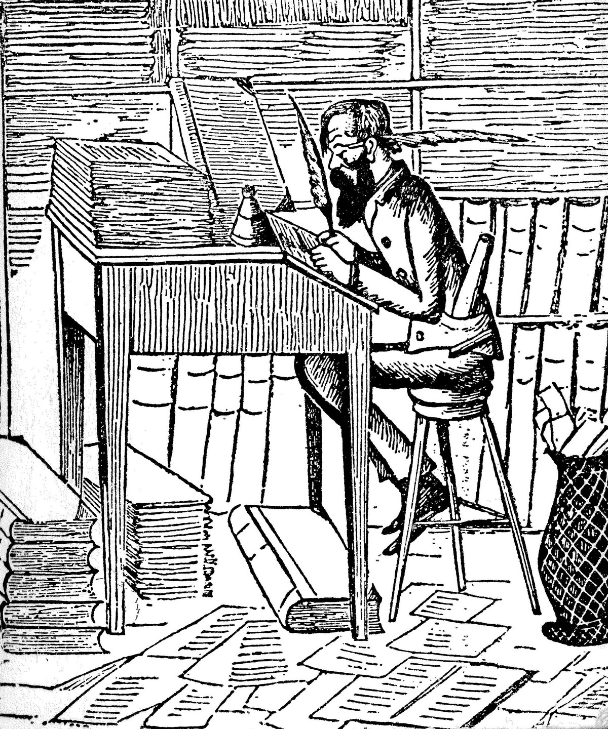 Karikatur av A.O.Vinje - utgivar av dølen- i Vikingen 1865